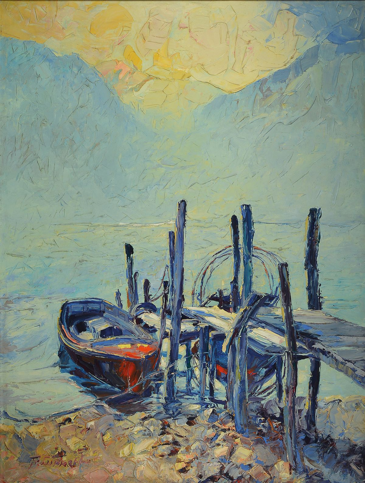 Der in Hannover geborene Kunstmaler Friedrich Karl Lippert (1894–1943) schuf dieses Ölgemälde. Es zeigt zwei an einem Holzsteg anliegende Boote auf einem See vor einer Gebirgslandschaft im Hintergrund. Das Werk, Öl auf Leinwand im Format 117x90 cm, ist unten links signiert Fr. Lippert